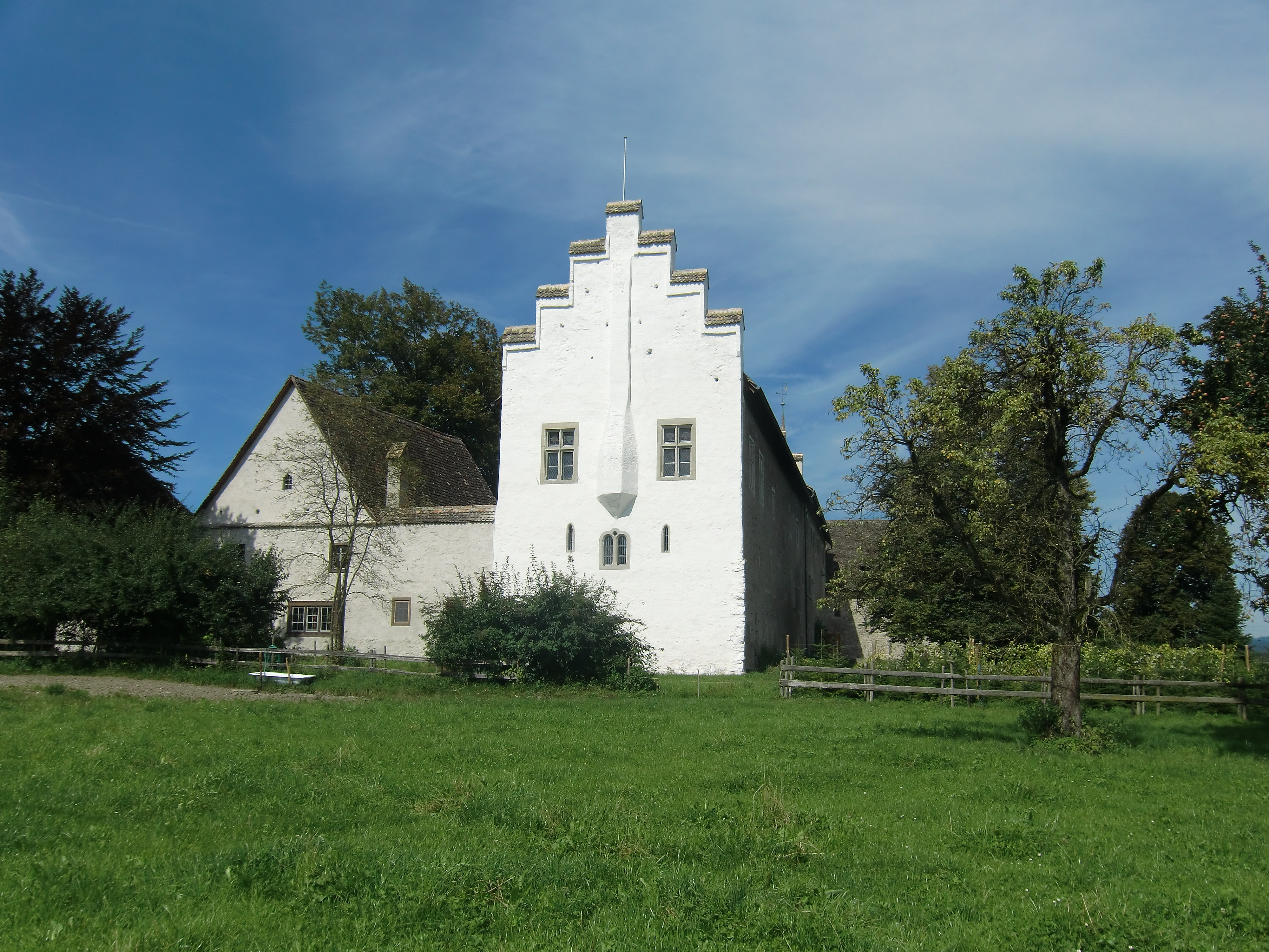 Südfassade des Ritterhauses in Bubikon nach der Fassadenrenovation 2010